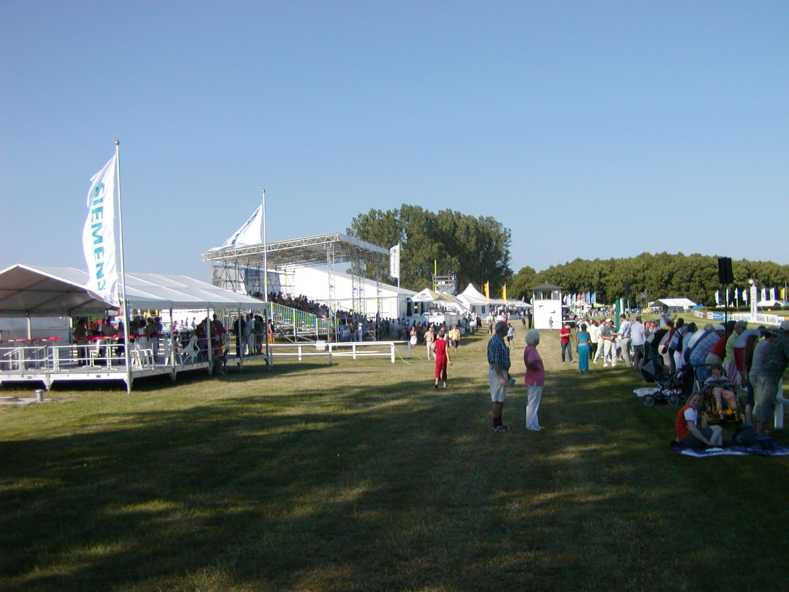 Rennbahn Bad Doberan